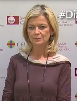 Mesa redonda La situación de la Justicia en España: una mirada en femenino. 7 de marzo de 2016, con Gabriela Bravo, Consellera de Justicia de la CV; Pilar de la Oliva, presidenta del TSJCV; y Victoria Ortega, presidenta del Consejo General de la Abogacía Española. Moderada por Rosa Visiedo, rectora de la CEU-UCH.